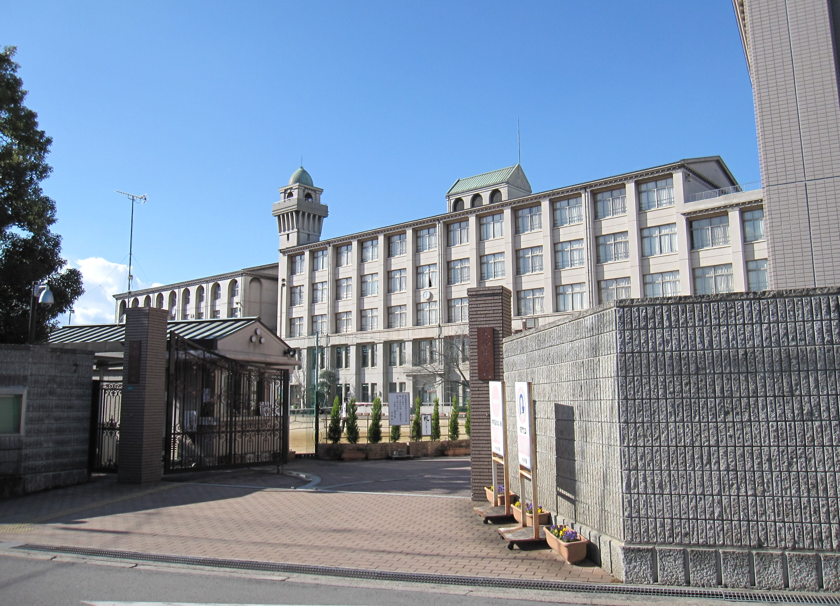 大谷中学校・高等学校 (大阪府)